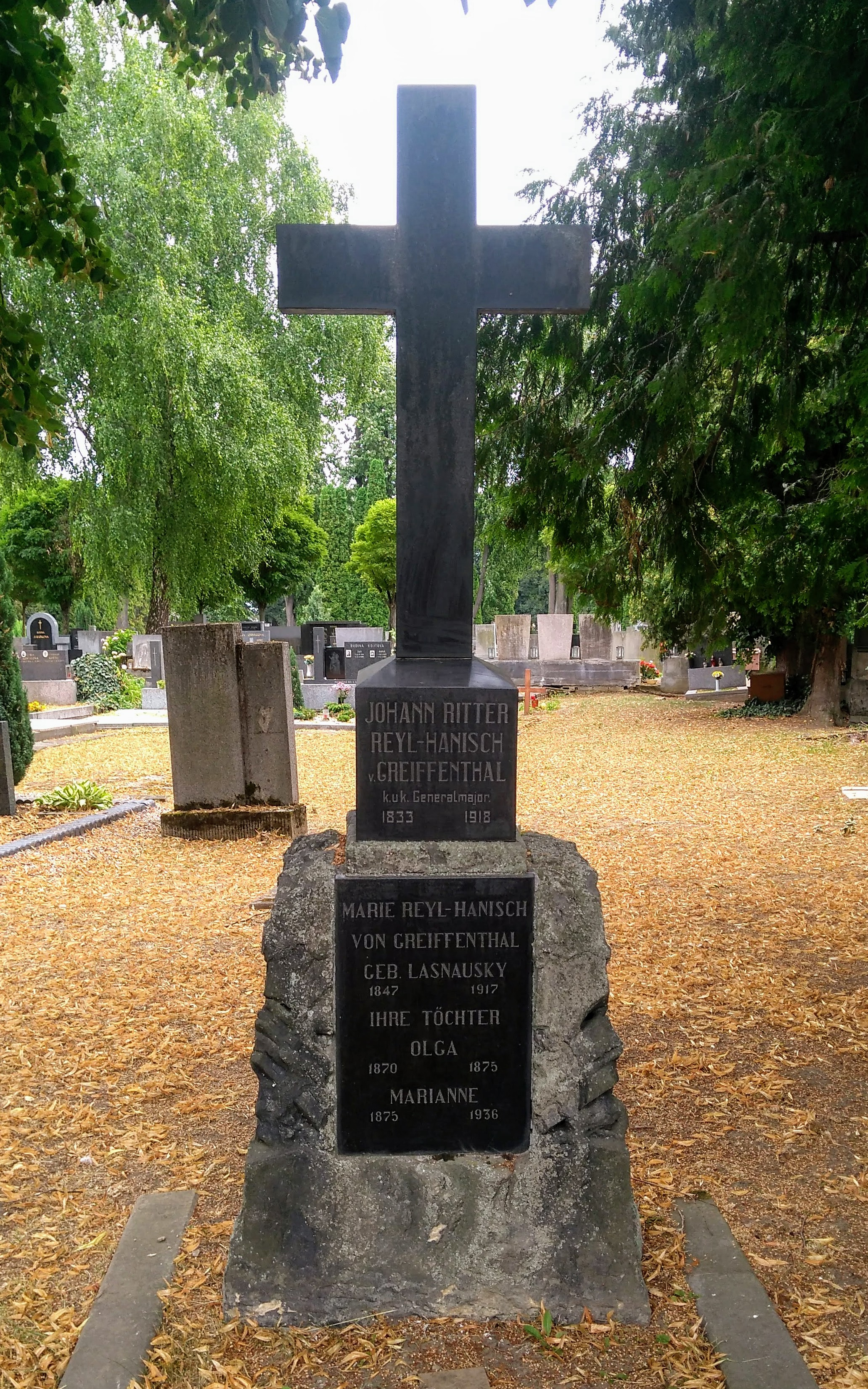 Rodinný hrob Johann Ritter Reyl-Hanisch von Greiffenthal, 29. dubna 1833, Hradec Králové 18. března 1918 Kroměříž manželka Marie roz. Lasnausky 1847-1917 dcery Olga 1870-1876, Marianne 1875-1936